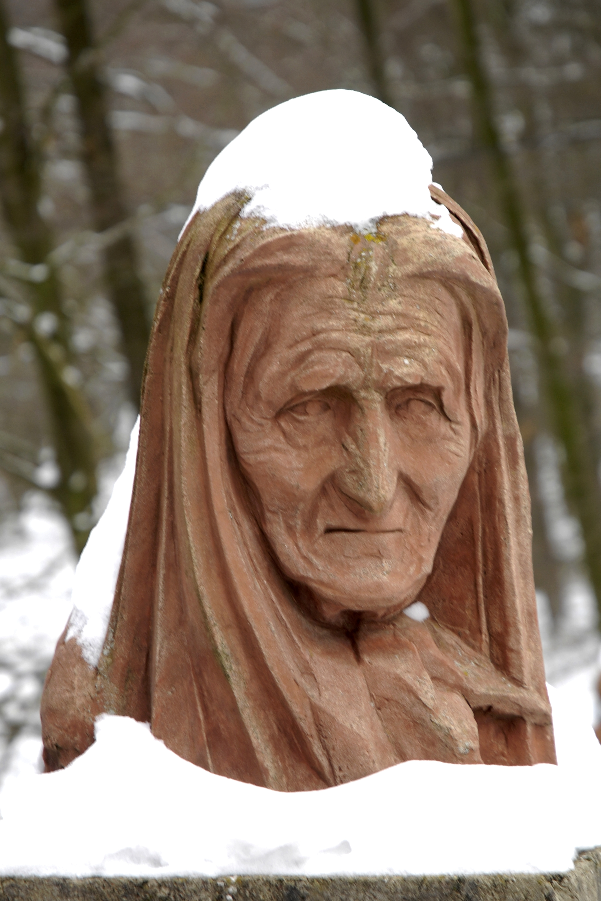 Peter August Böckstiegel, Bildnis/Skulptur der Mutter am Böckstiegel-Haus in Werther-Arrode, Januar 2010